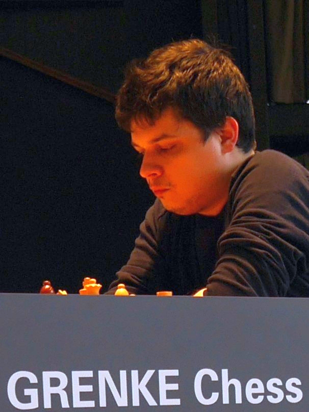 Viktor Erdös, Grenke Chess Open 2017 in Karlsruhe.